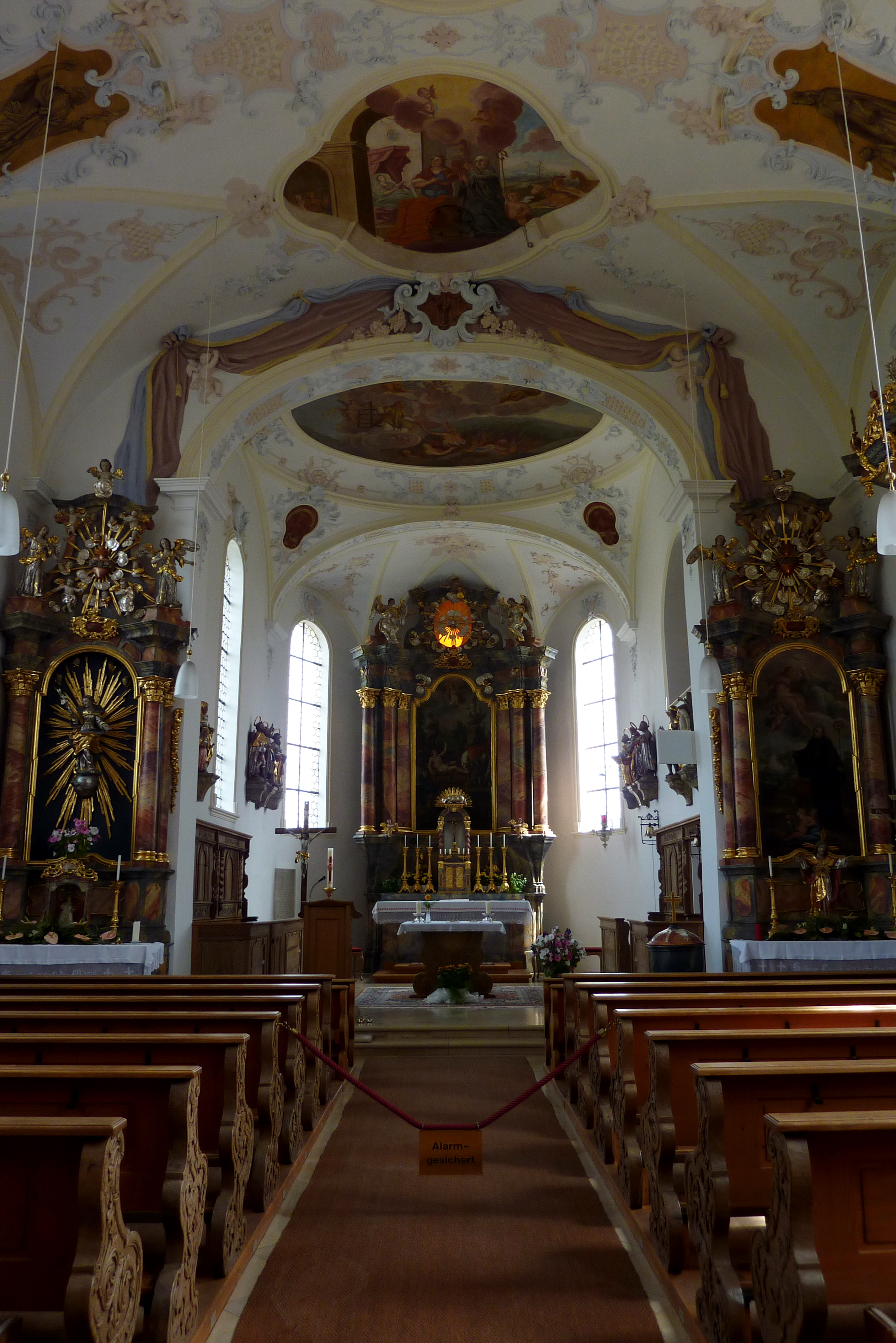 Katholische Pfarrkirche St. Laurentius in Agawang, einem Ortsteil von Kutzenhausen im Landkreis Augsburg (Bayern), 1732 erbaut, Innenraum mit Blick zum Chor